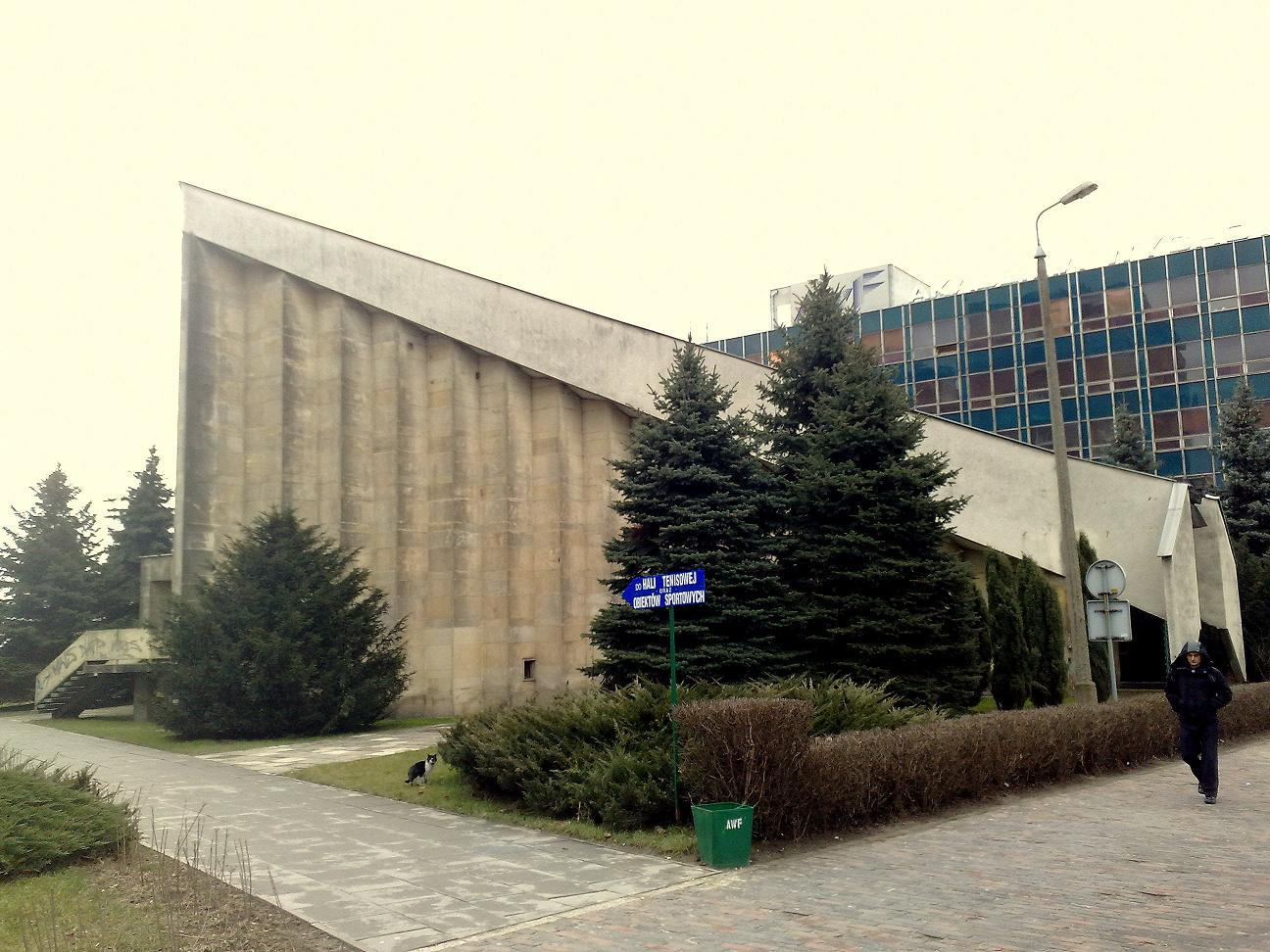 Aula, Akademia Wychowania Fizycznego w Krakowie